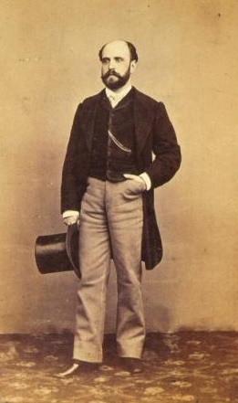 Ángel María Dacarrete, fotografía de J. Laurent. Museo de Historia de Madrid